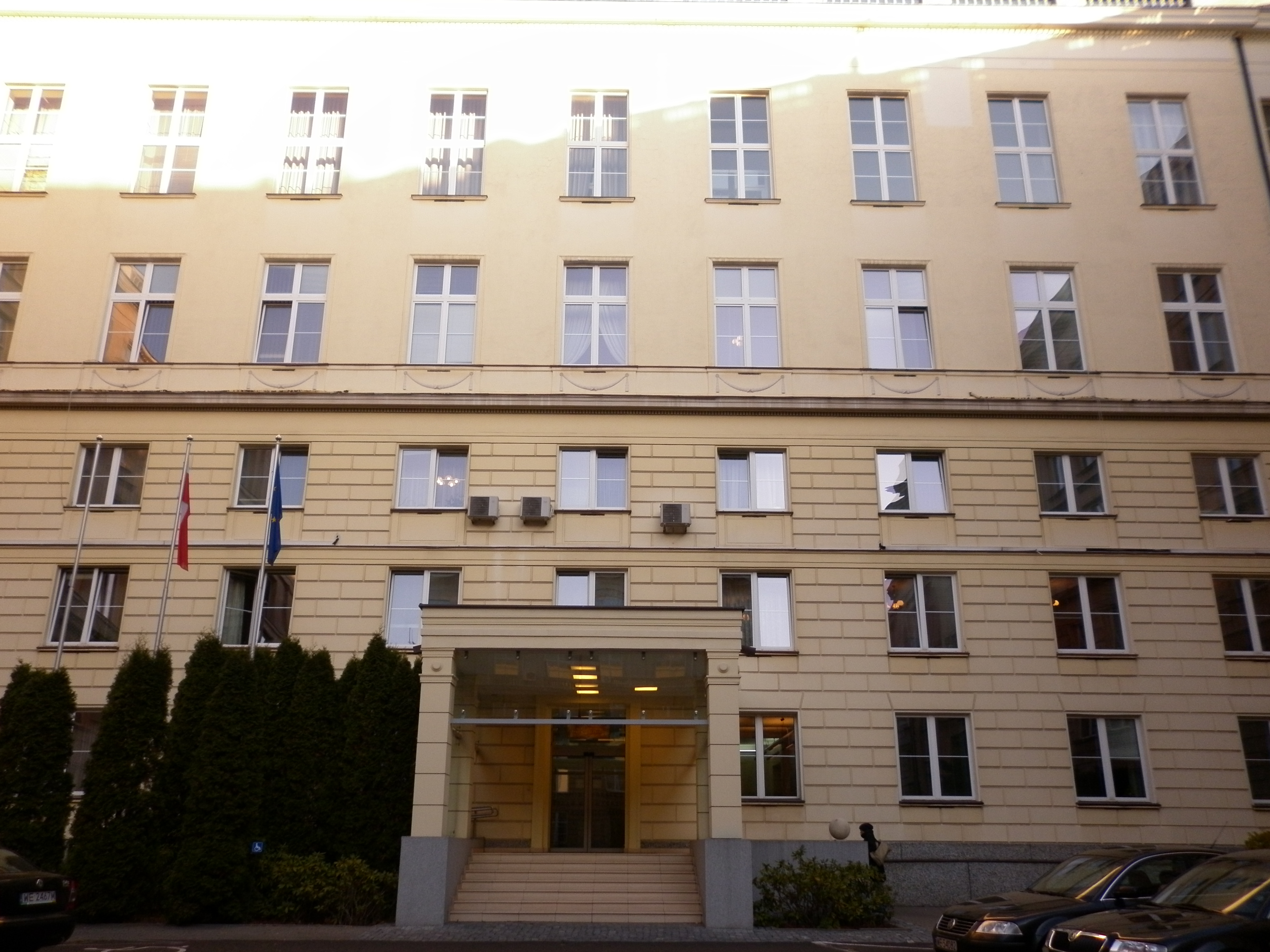 Gmach MSWiA przy ulicy Rakowieckiej